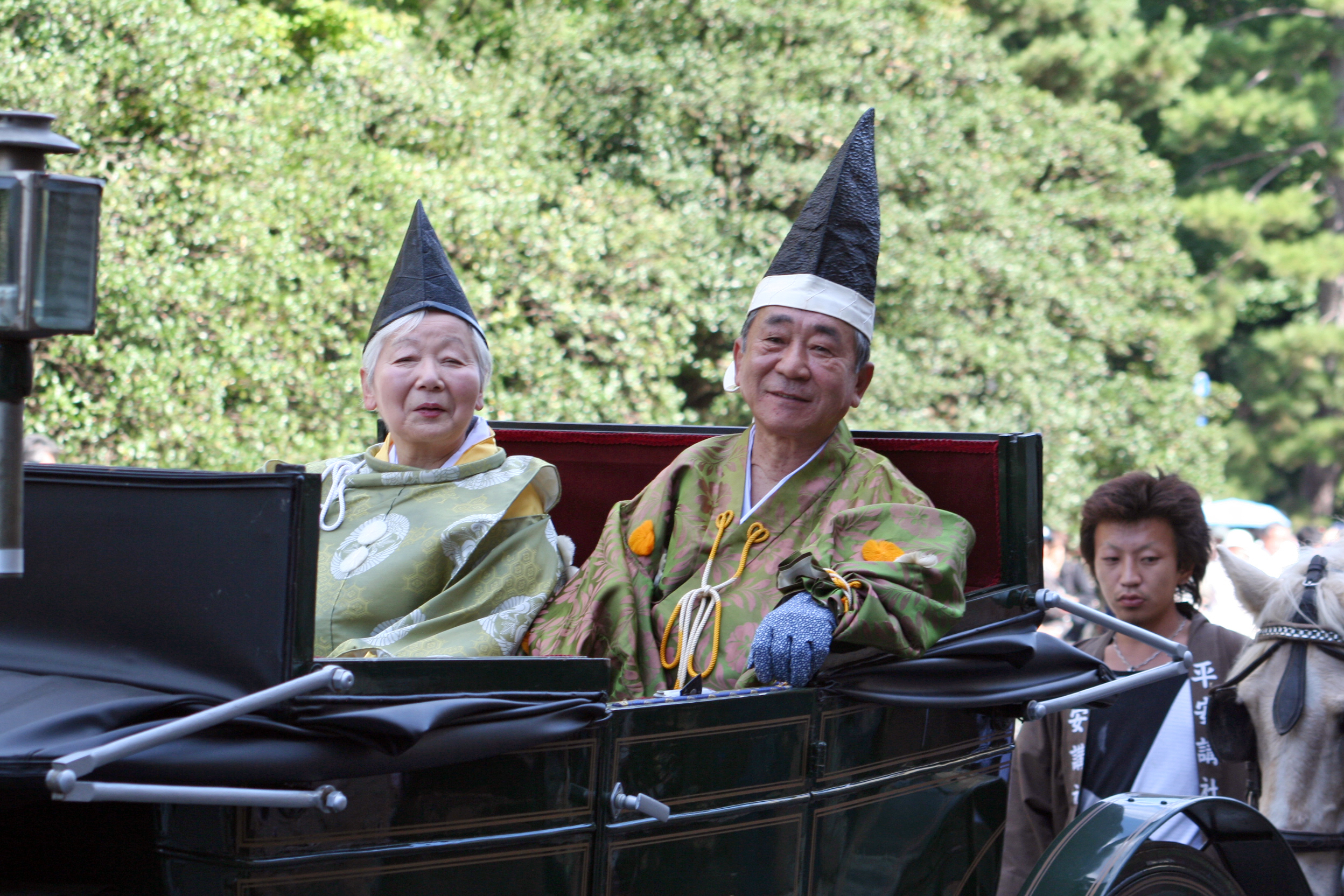 京都府京都市にて開催された時代祭。正午の御所から平安神宮までの行進の様子。2009年10月22日撮影。 繁隆夫京都市会議長(右)と我孫子和子京都市会議長(左)。